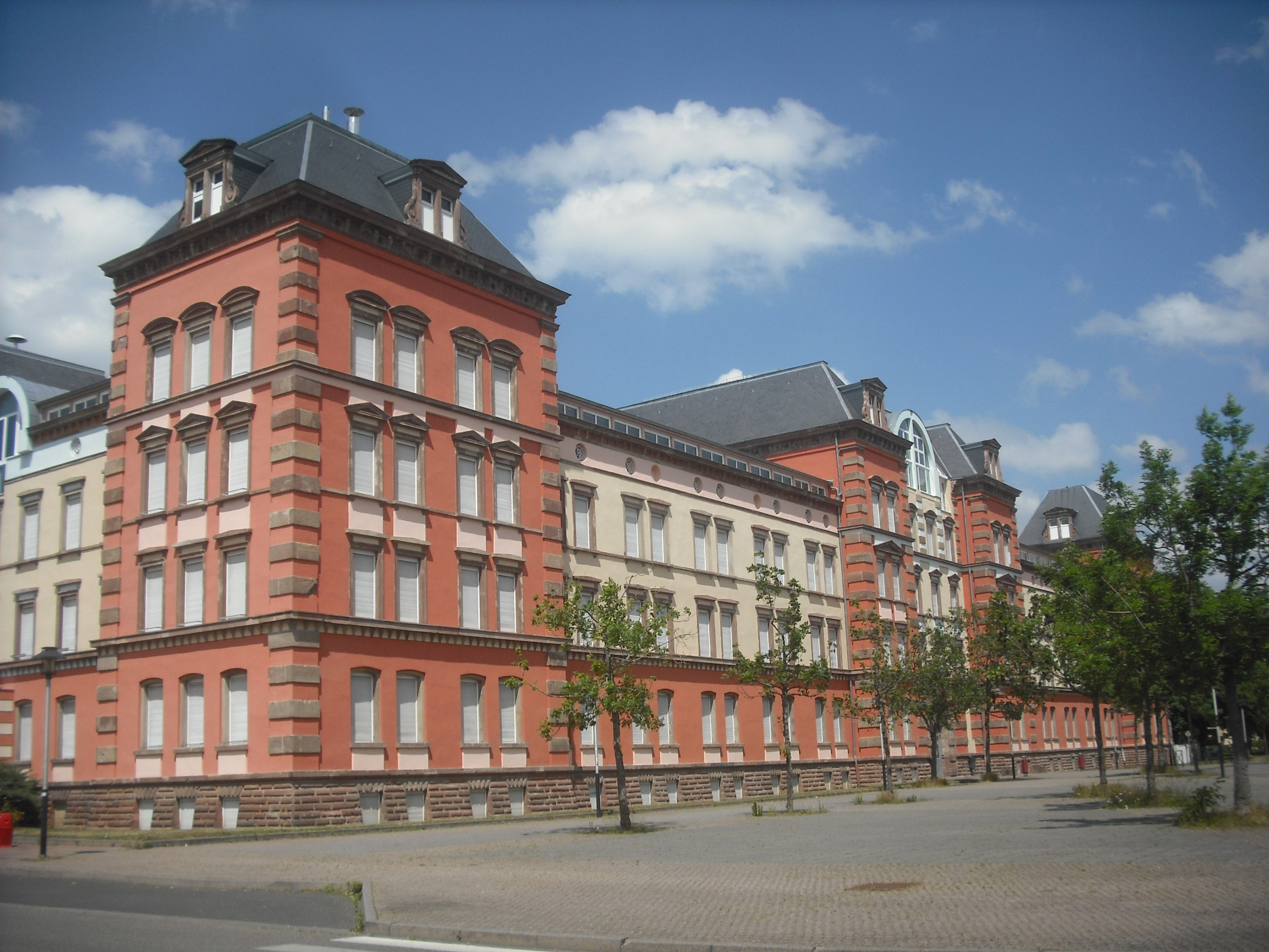 Lycée Schweisguth, Sélestat, Bas-Rhin, France.